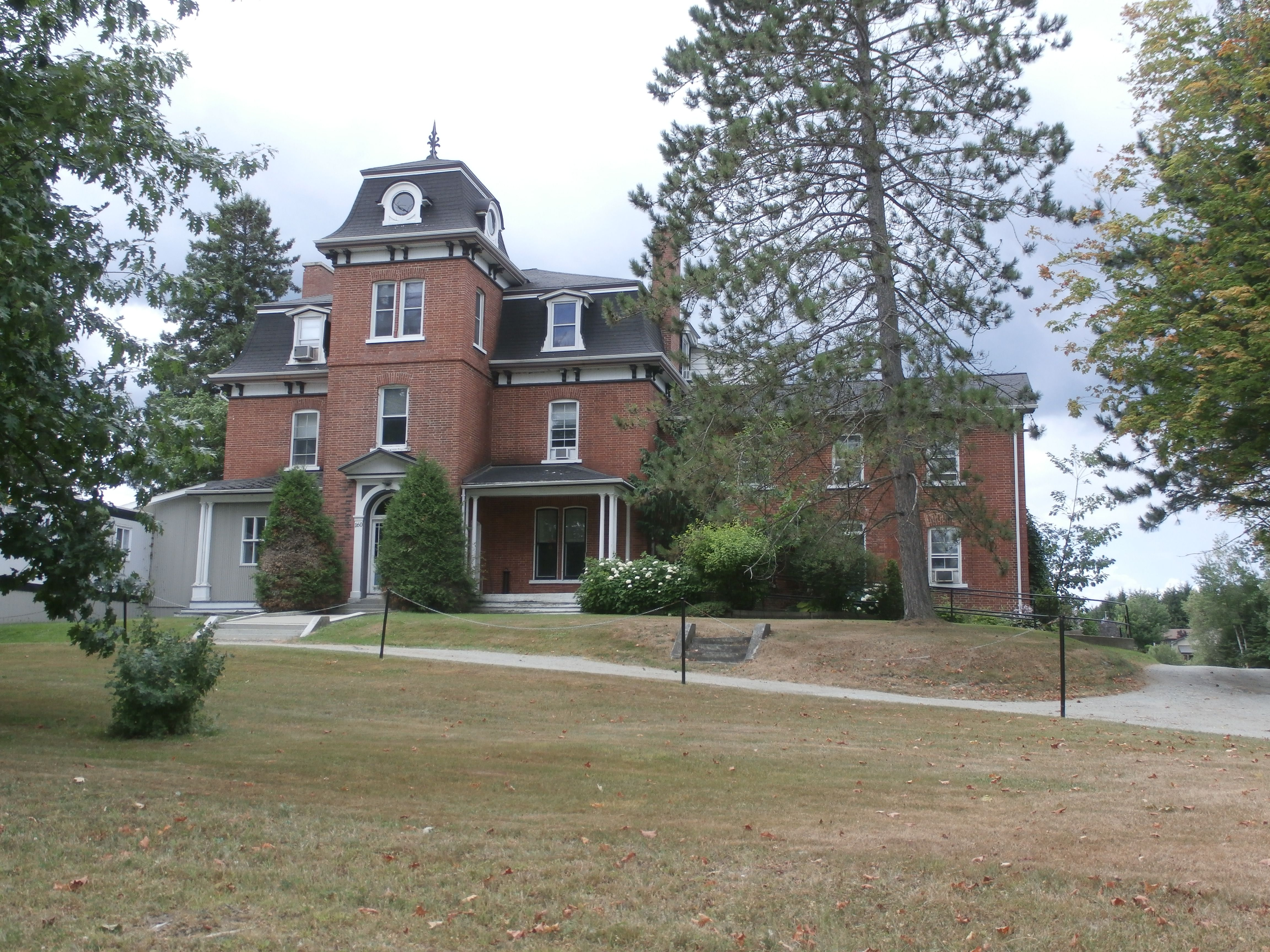 Maison John Henry Pope construite en 1880 rue principale Cookshire.